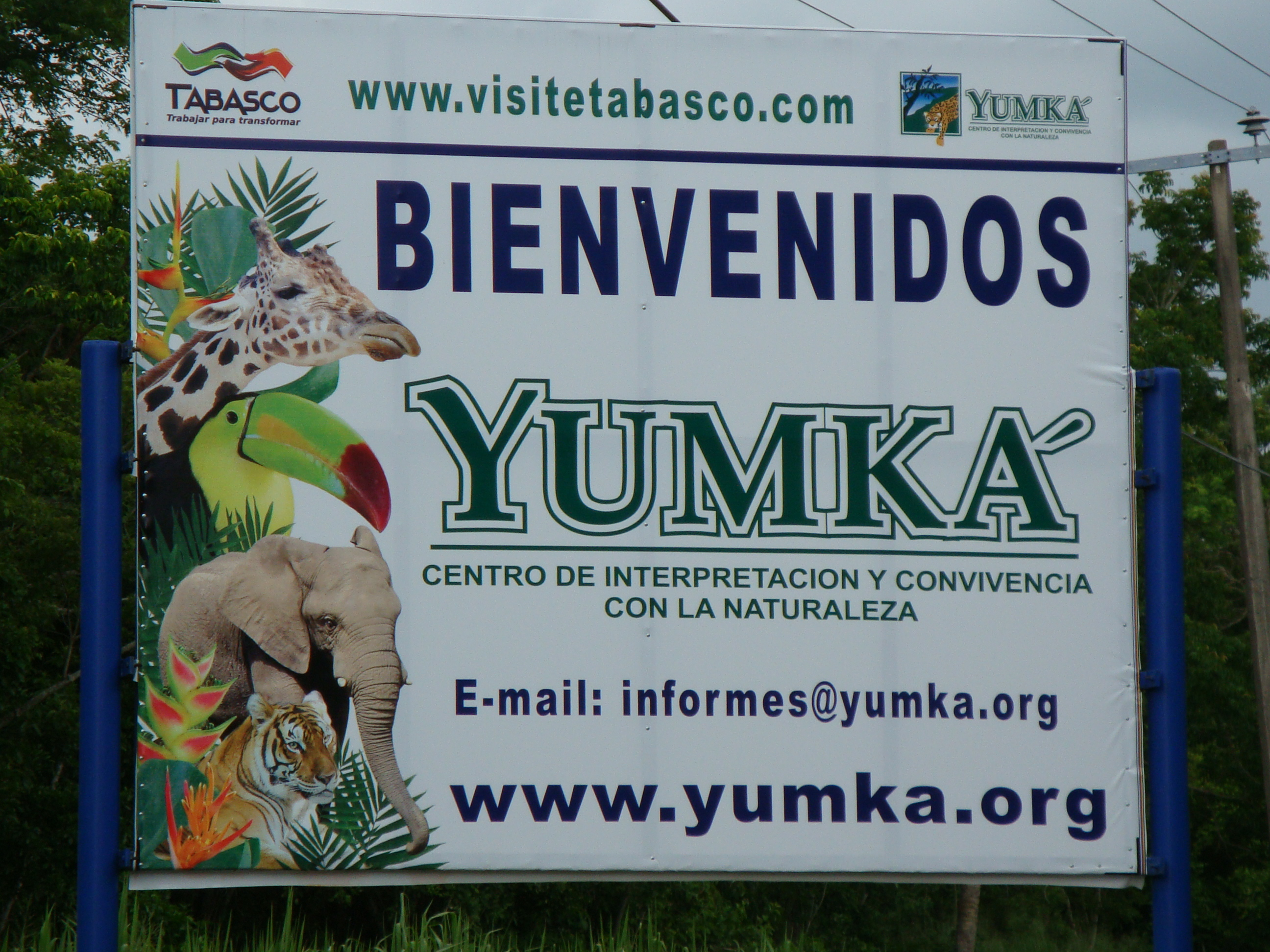 Letrero de bienvenida en el Parque ecológco "Yumká"